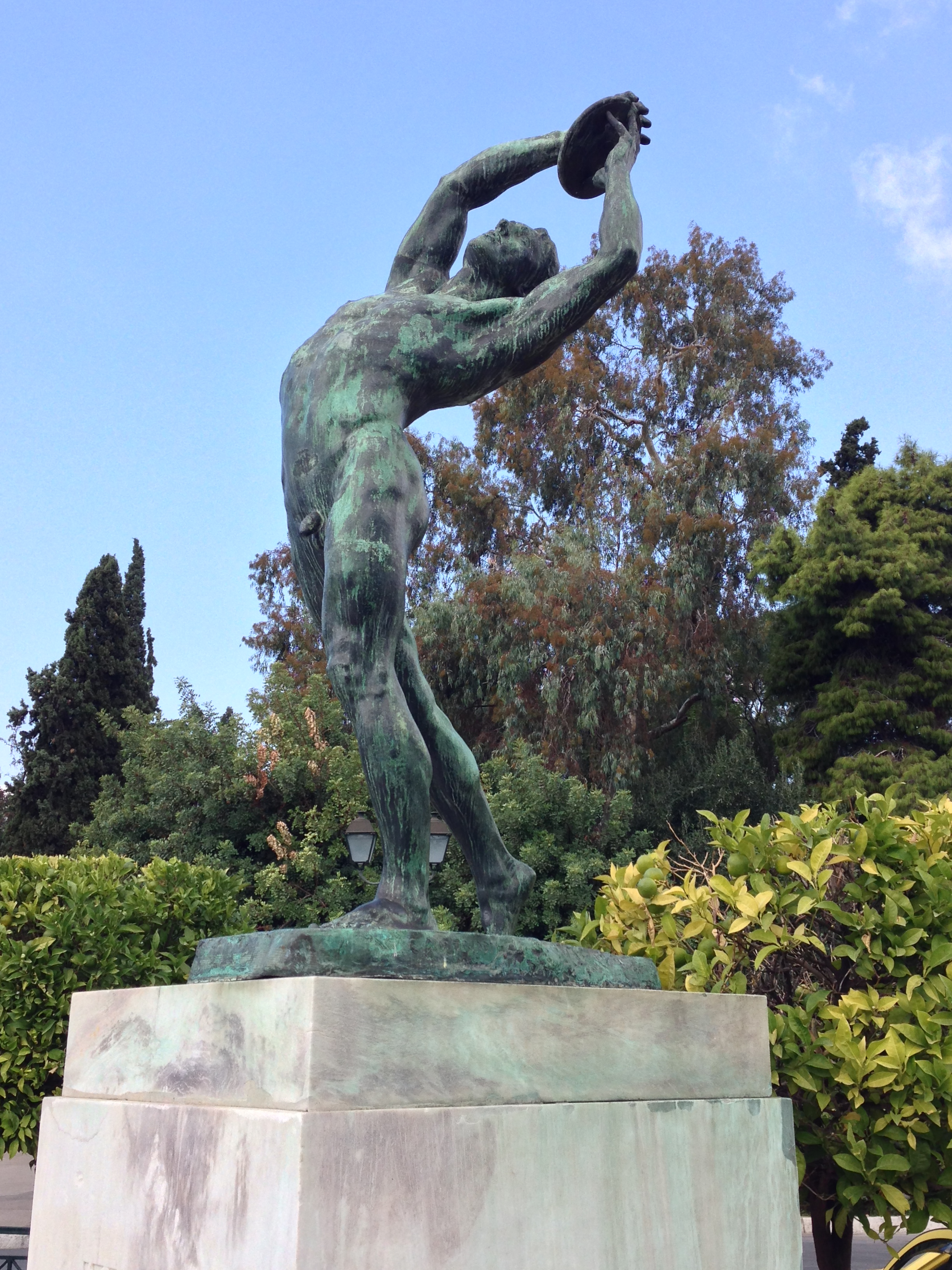 Δισκοβόλος, Παναθηναϊκό Στάδιο